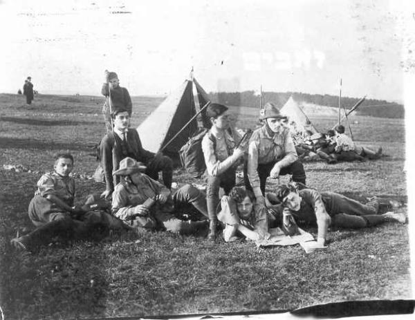 מחנה של "השומר הצעיר" באחת מארצות אירופה